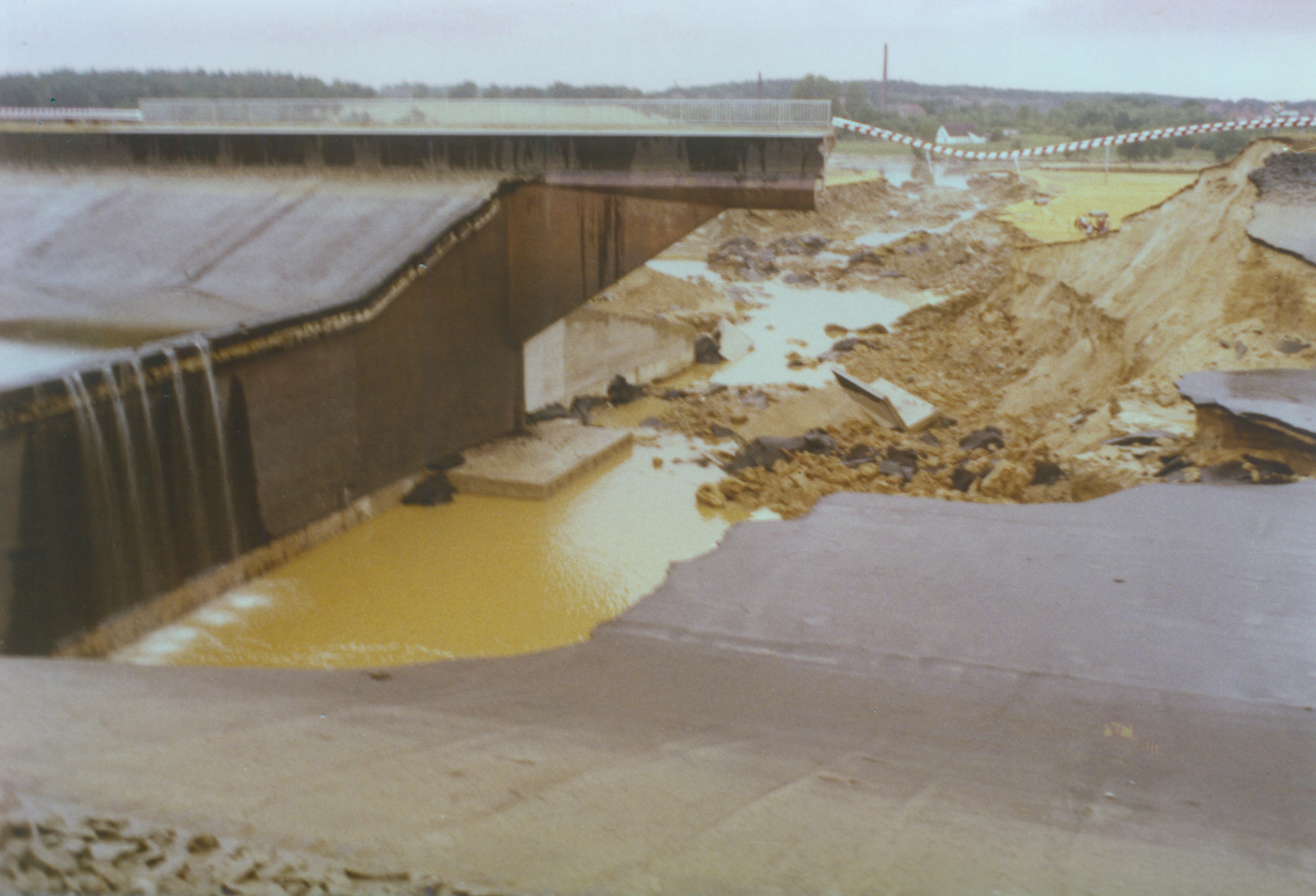 Bruch des Elbeseitenkanals bei Lüneburg Juli 1976